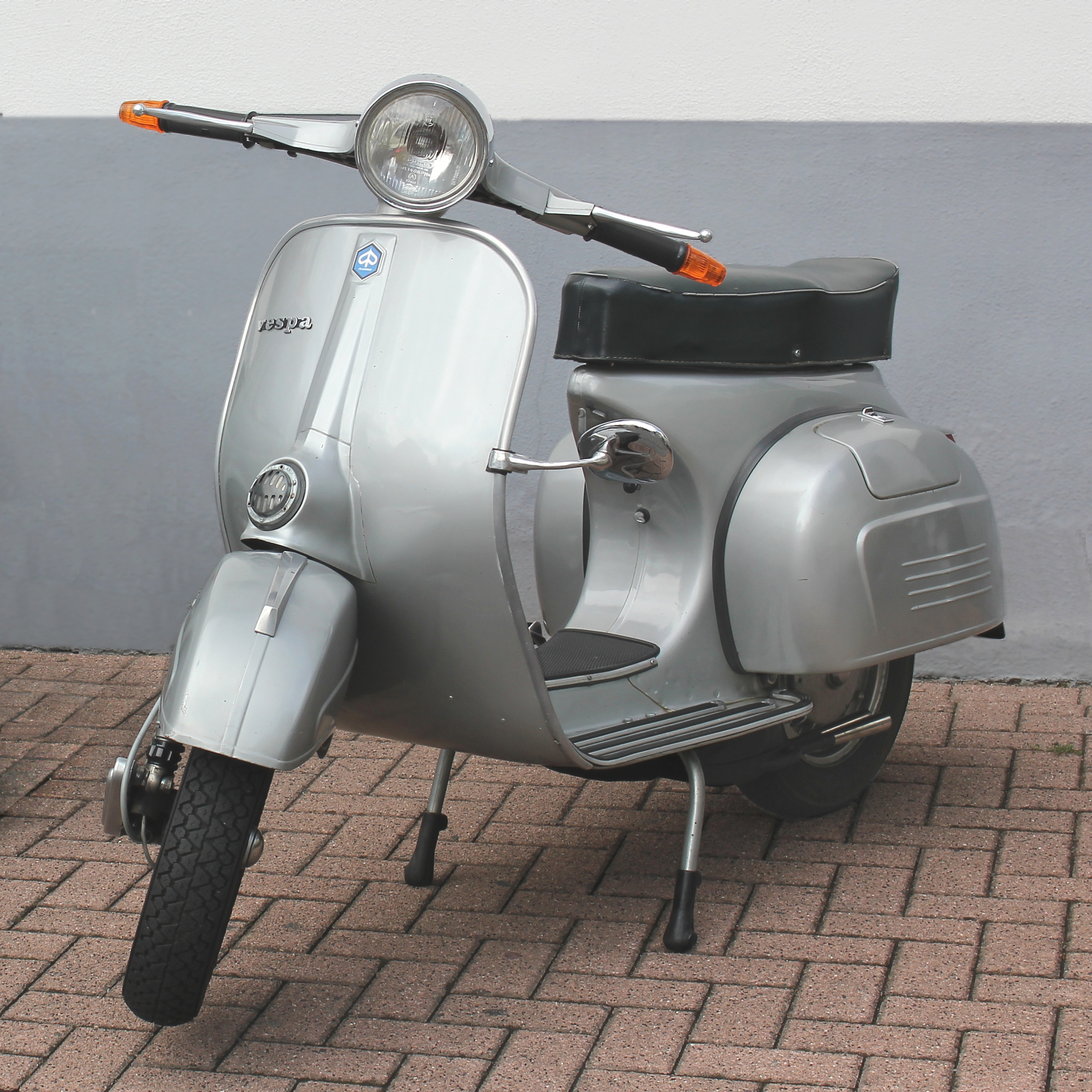 Vespa 150 Sprint V., Bauzeit 1969 bis 1979, Version der „Veloce“ für Deutschland mit Blinkern an den Lenkerenden. Fotografiert bei einer Ausstellung des AC Mülheim-Kärlich anlässlich des Stadtfestes